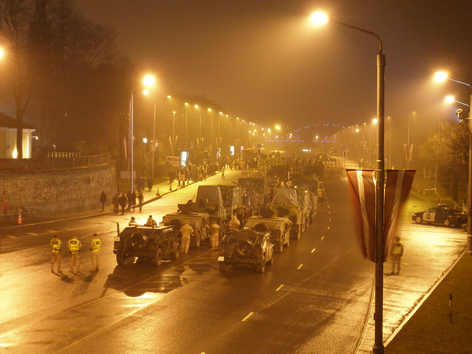 11. novembra krastmala naktī, skatoties no Vanšu tilta. Gatavošanās 18. novembra parādei.